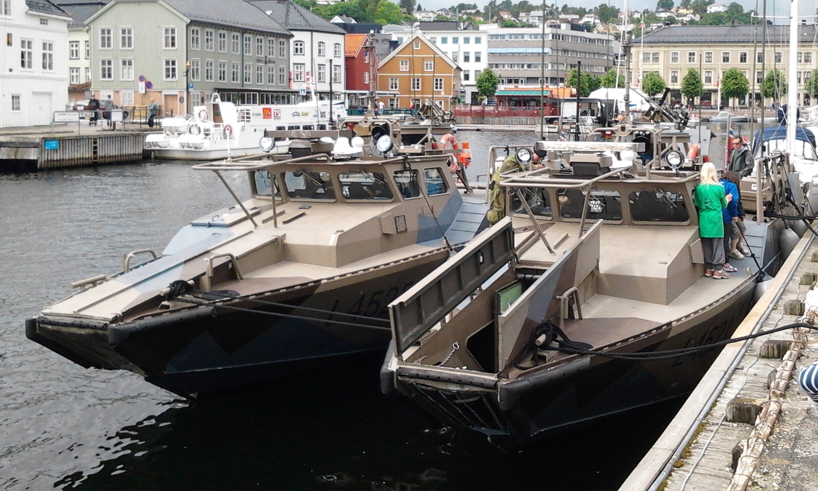 2 stk Stridsbåt 90N i Arendal, Norge